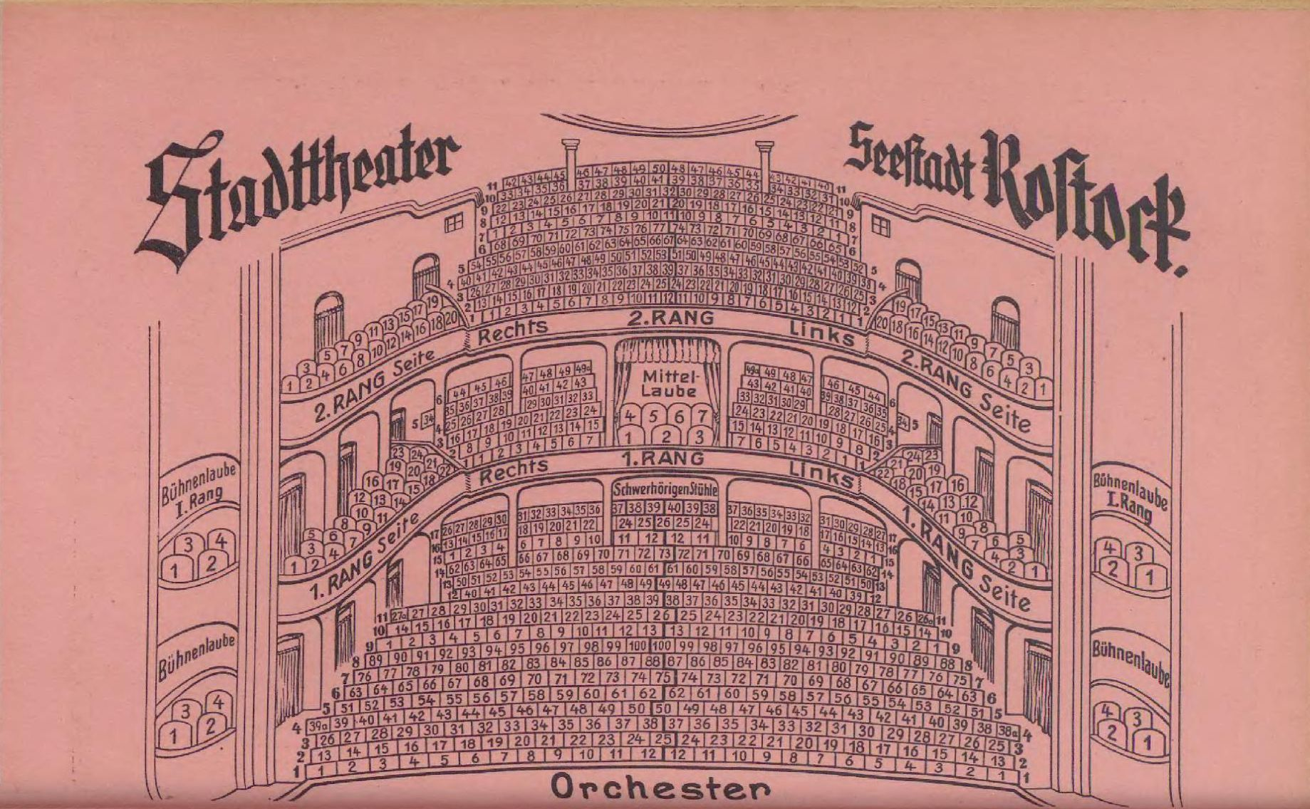 Rostocker Adressbuch 1939 - Anzeige Stadttheater - Sitzplan